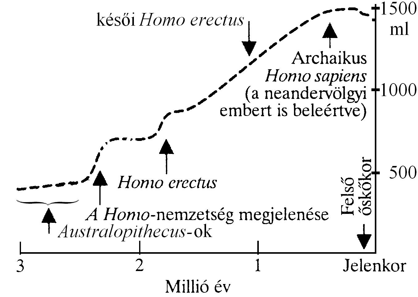 Az emberősök agyméretének változása az idő függvényében